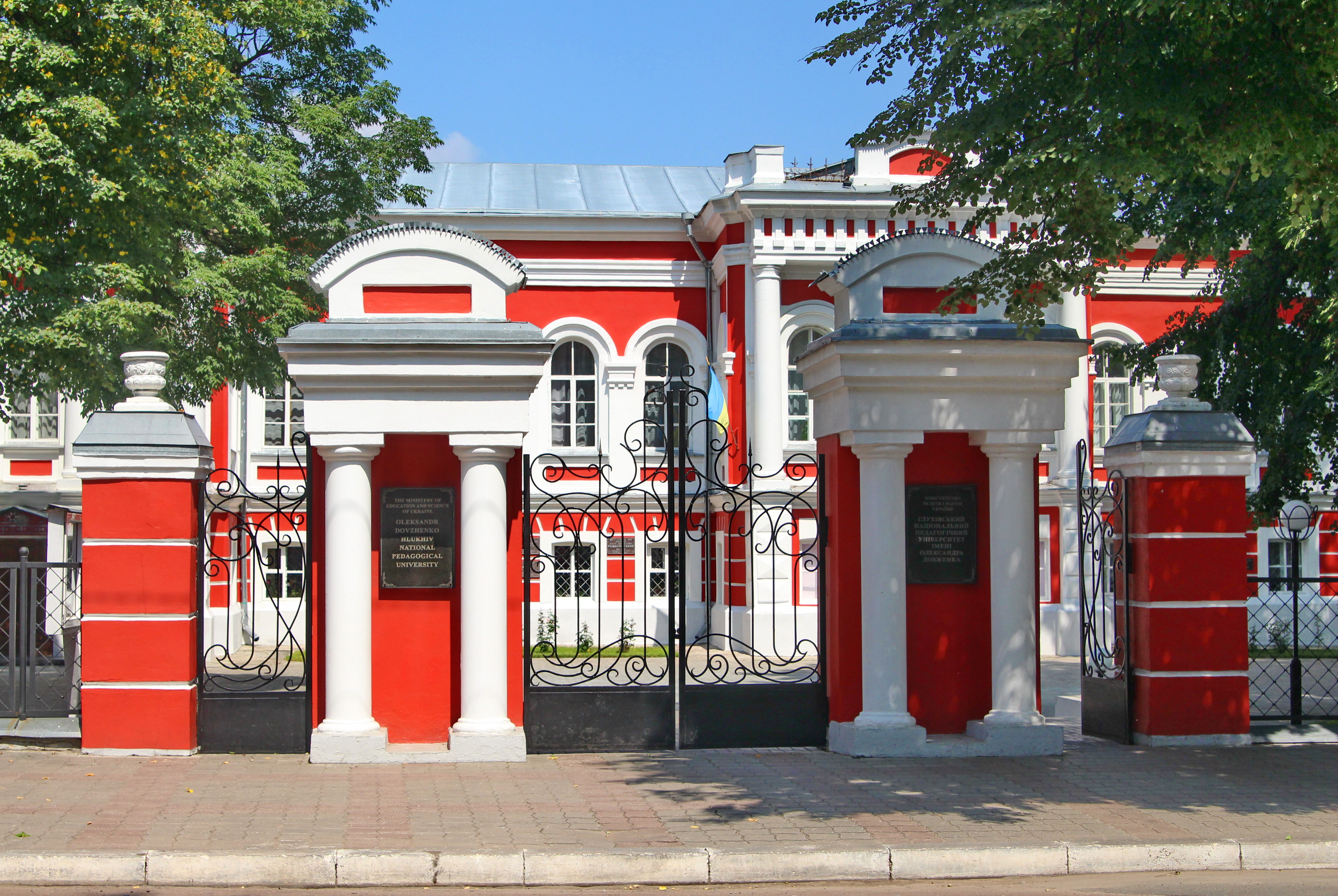 Глухівська чоловіча гімназія, Глухів, вул. Києво-Московська, 24